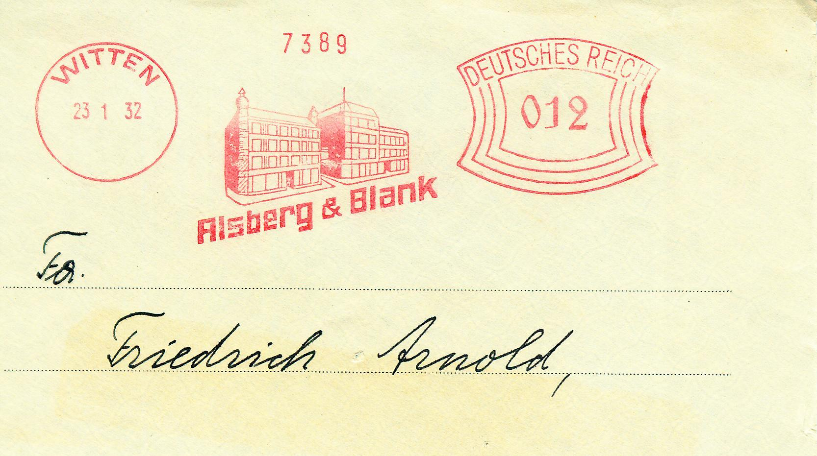 Frankotyp-Absenderfreistempel der Reichspost-Portostufe für Briefe im Fernverkehr, Kaufhaus Alsberg und Blank, Witten